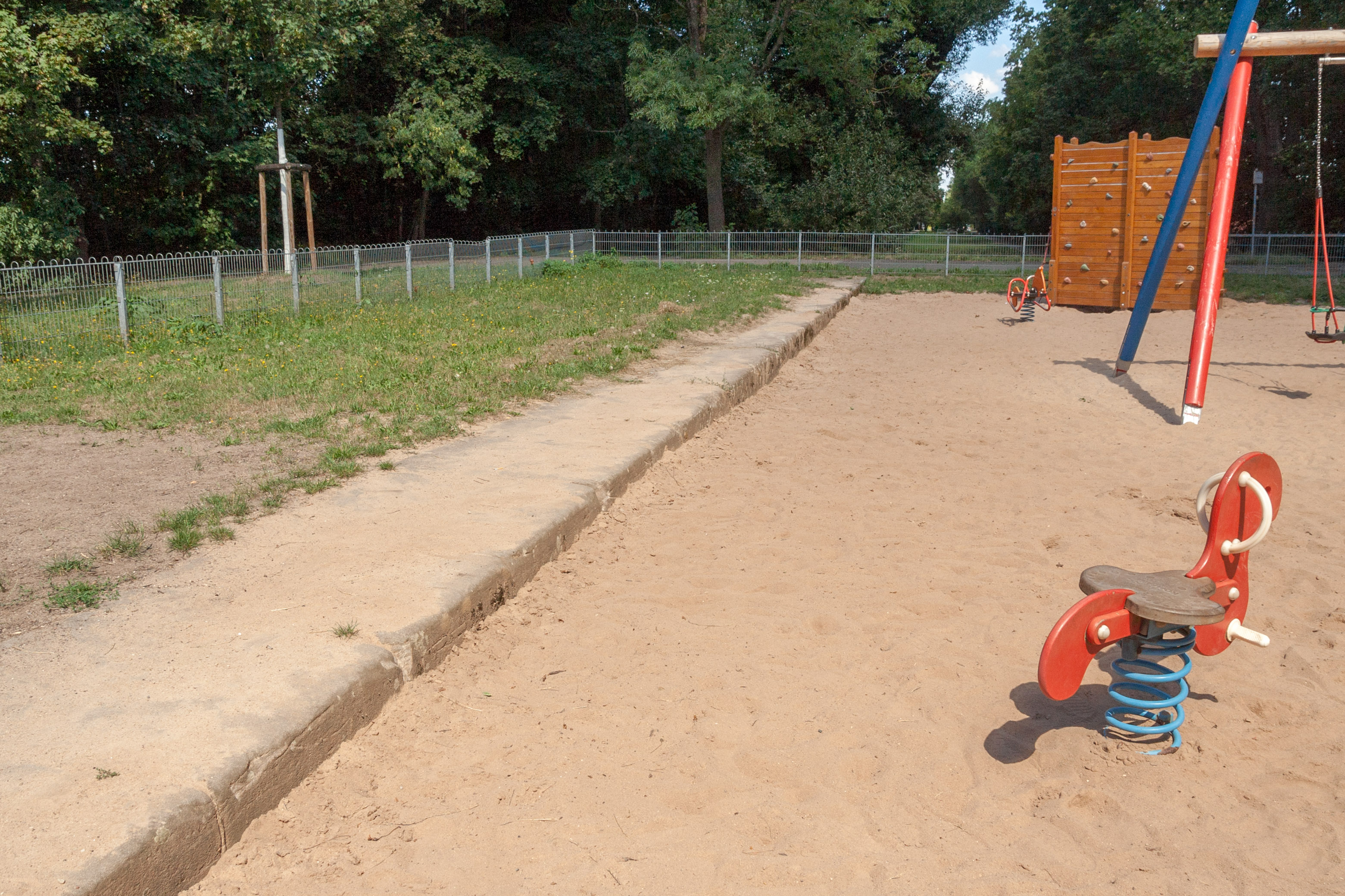 Ludwig-Donau-Main-Kanal, Schleuse 74, Schleusenkammer